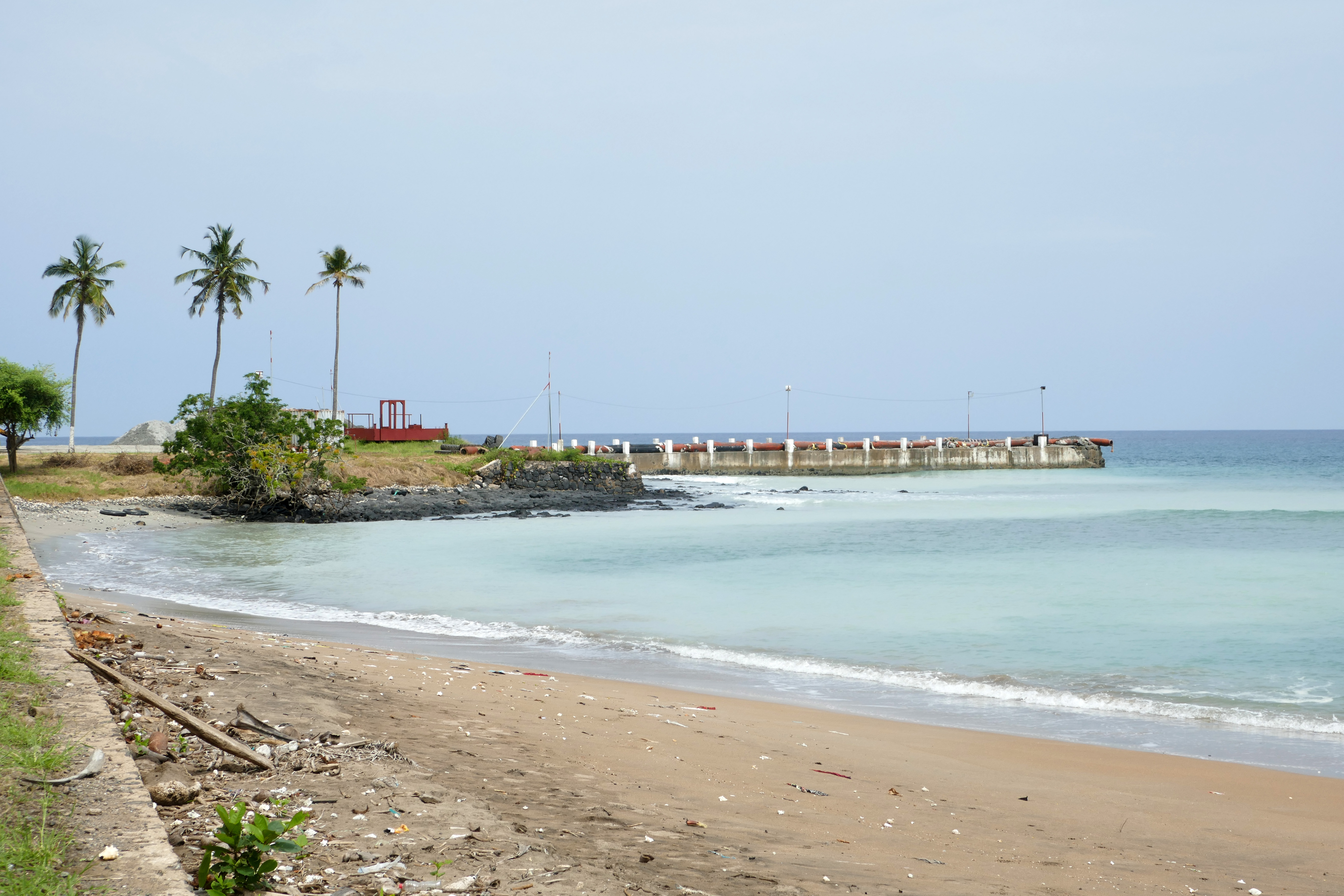 Jetée de Fernão Dias au nord de l'île de São Tomé.